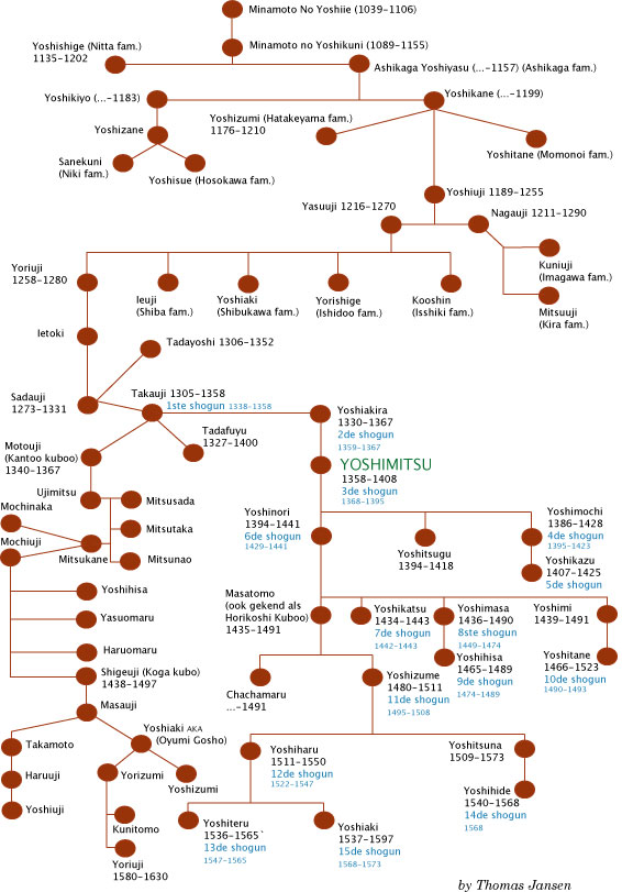 Stamboom van de Ashikaga familie in Japan met nadruk op Ashikaga Yoshimitsu. Zelfgemaakt en geschonken aan het publiek domein.